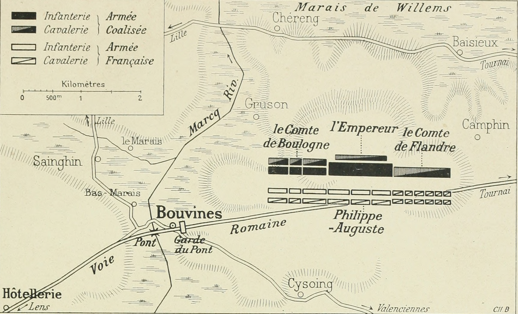 Batalla de Bouvines